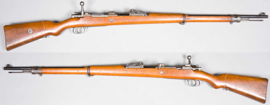 Nemška puška Gewehr 98.